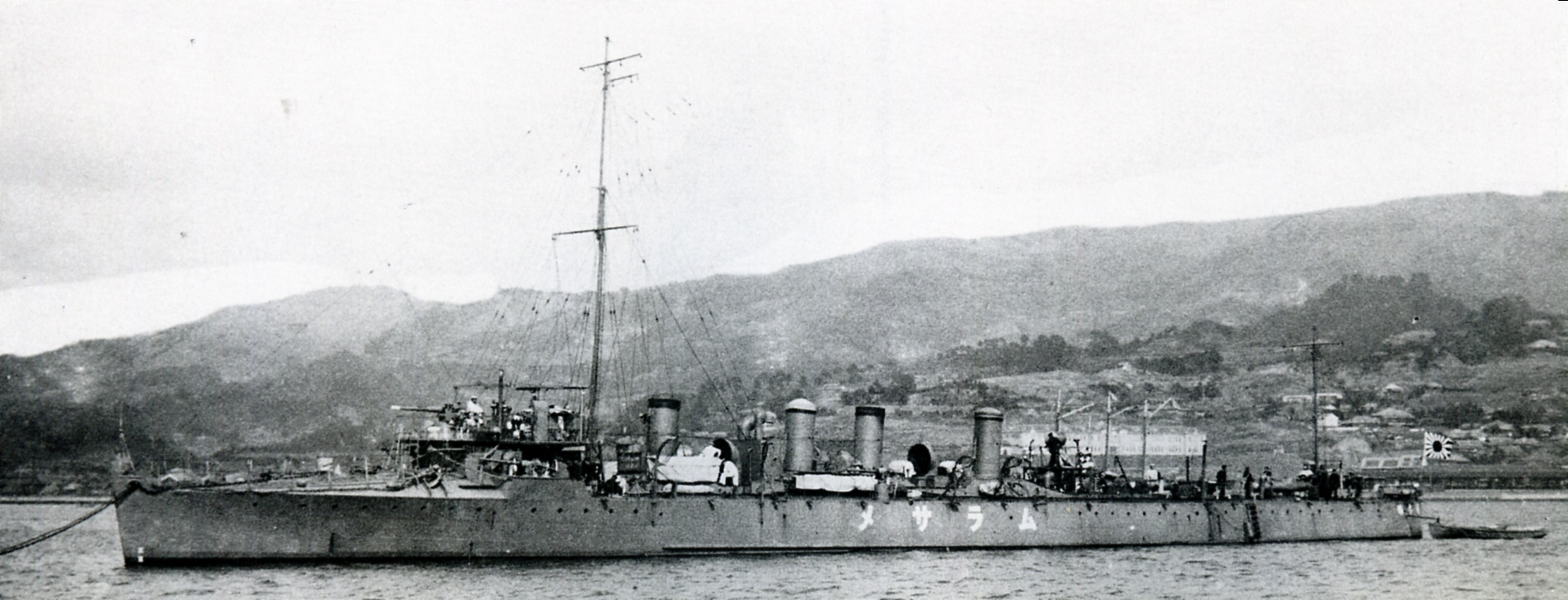 Japanese destroyer Murasame at Sasebo, Japan 1919